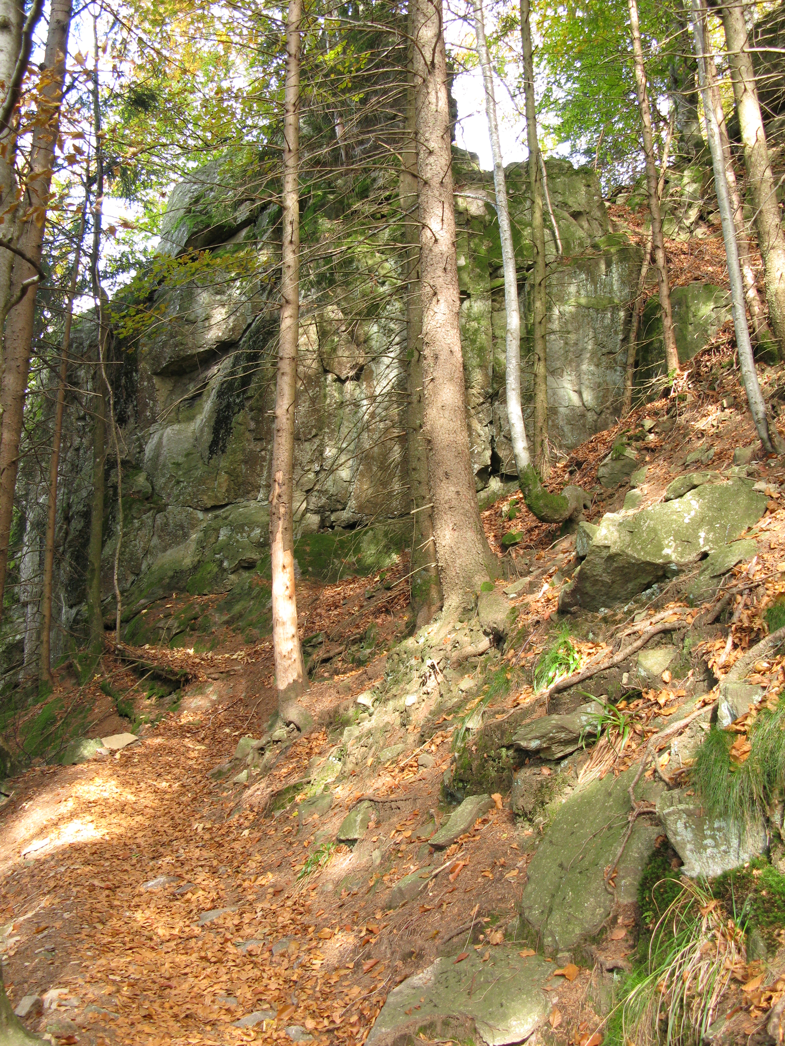 Pfad beim kleinen Kandelfelsen am Zweitälersteig unterhalb der Thomashütte am Kandel im Schwarzwald.